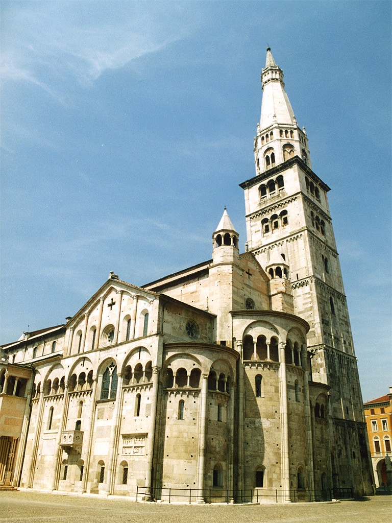 Modena, Emilia Romagna, Italia